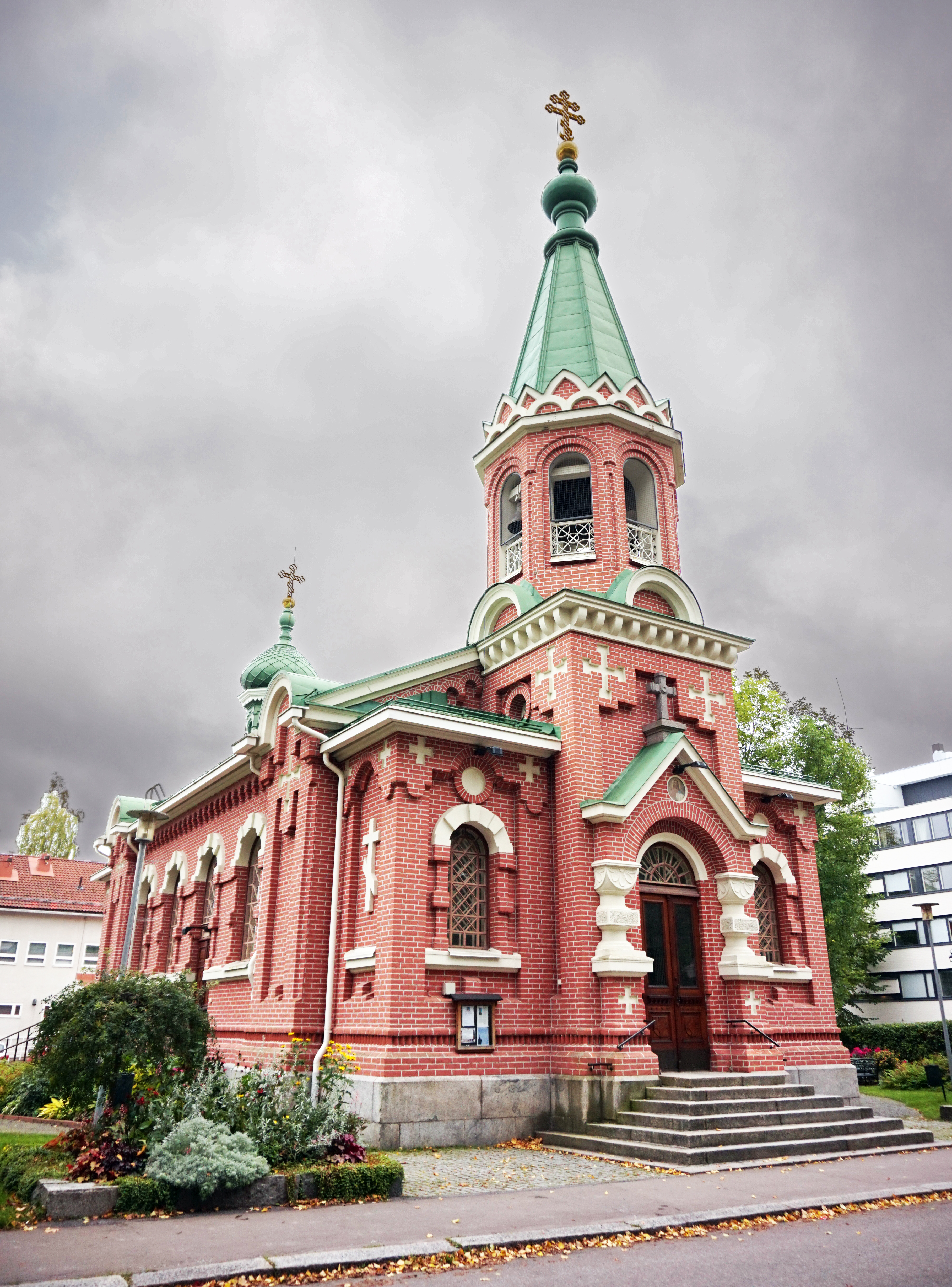 Pyhän Nikolaoksen katedraali; kirkkorakennus Kuopiossa